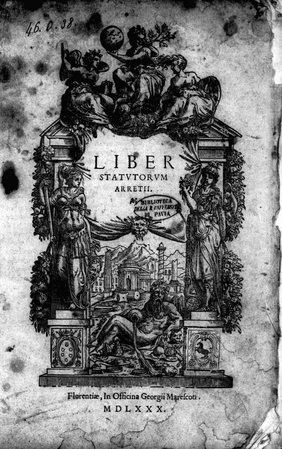 Frontespizio